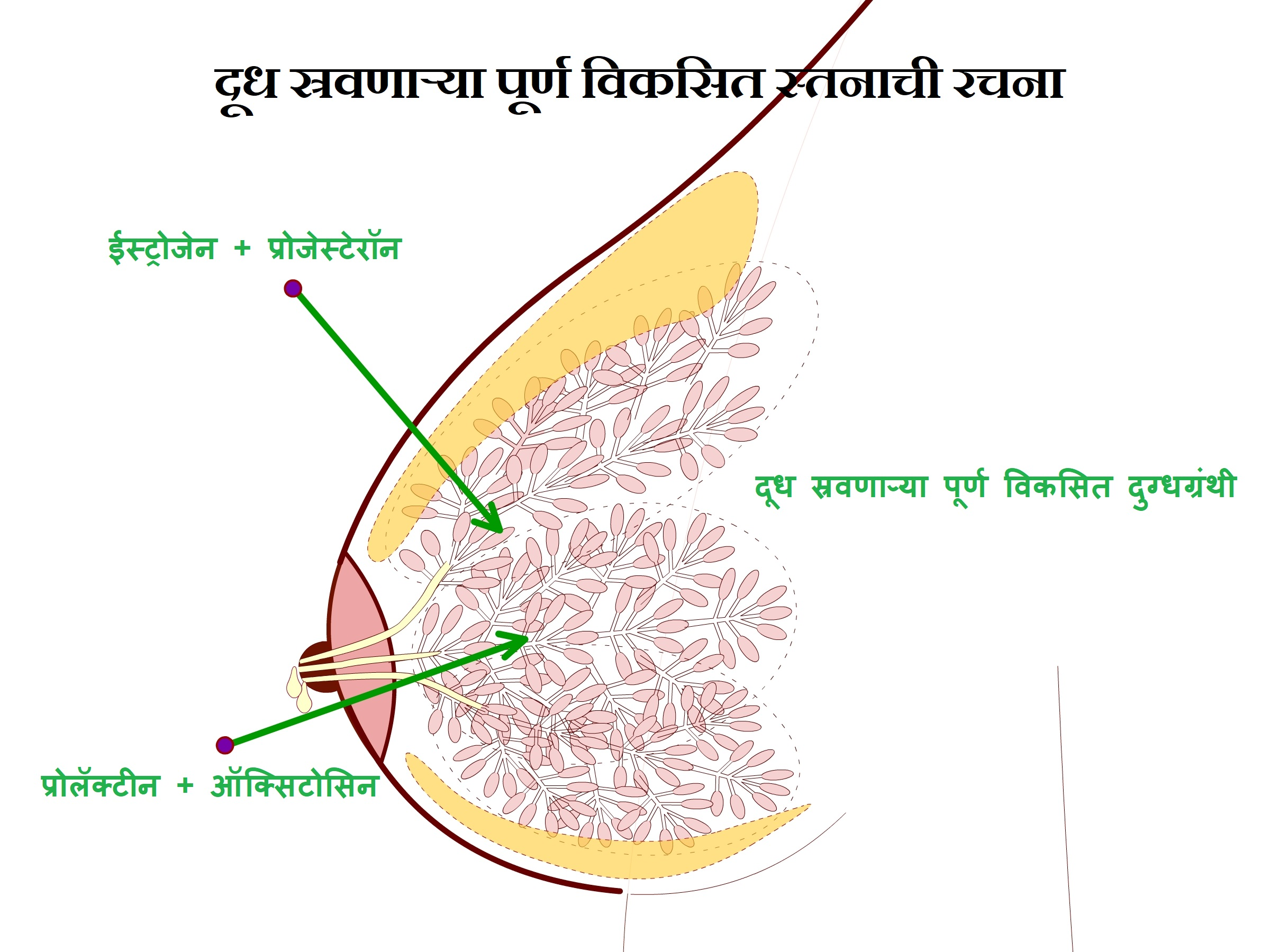 तारुण्यातील पूर्ण विकसित स्तनाचा गर्रभारपणात होणारा पुढील विकास आणि प्रसूतीनंतर दूधनिर्मिती व दूध स्रवणे हे दाखवणारी योजनाबद्ध आकृती. दुग्धग्रंथींची खंडात्मक रचना, प्रत्येक खंडातून निघणार्‍या व स्तनाग्रावर स्वतंत्रपणे उघडणार्‍या दुग्धनलिका, भोवतालचे चरबीचे आवरण.